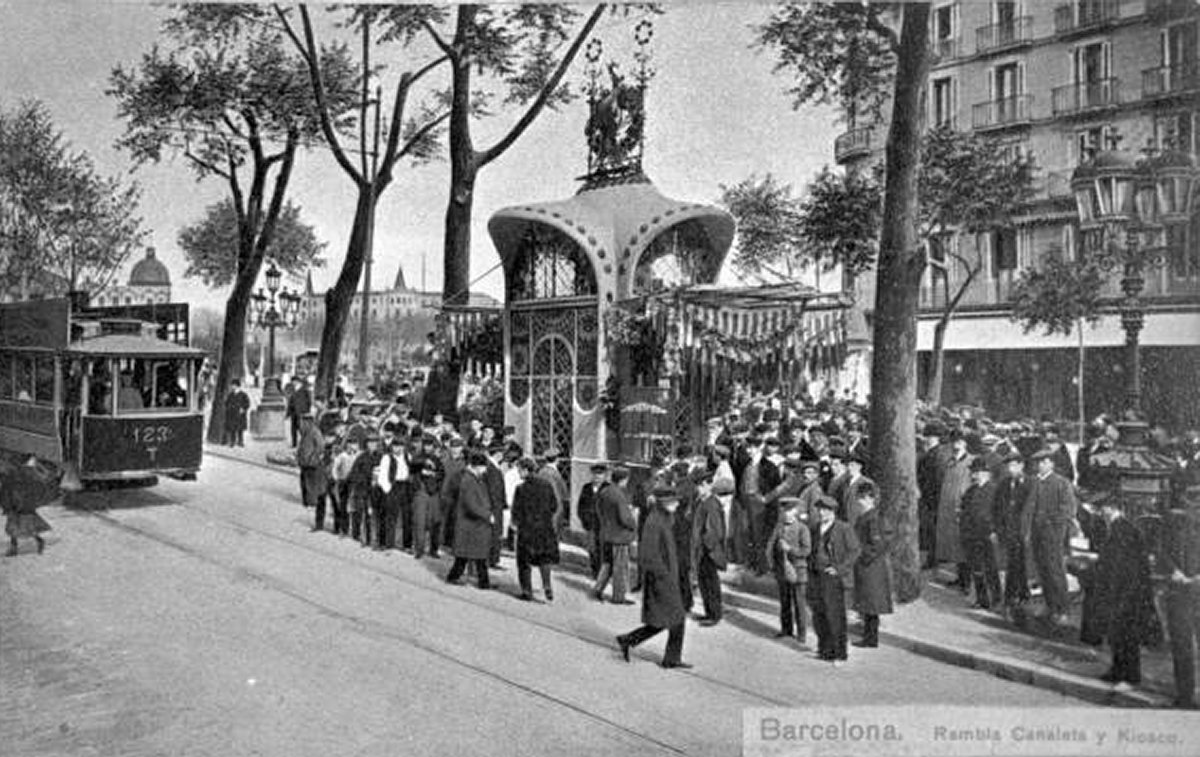 Quiosco de Canaletes.